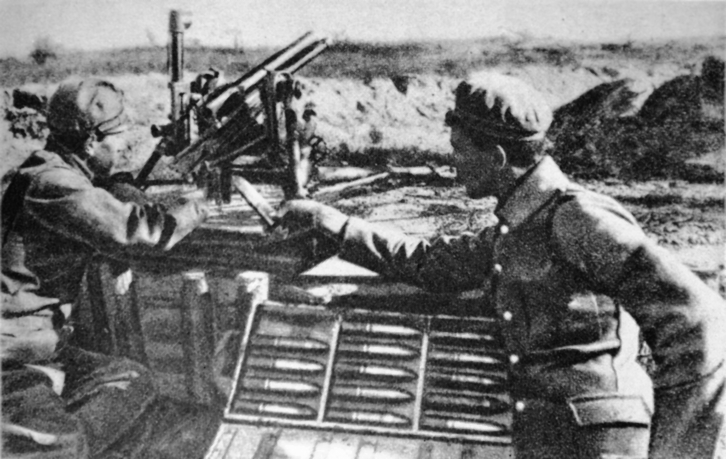 Działko 3.7 cm Infanteriegeschütz M.15 w 4 pułku piechoty Legionów Polskich.